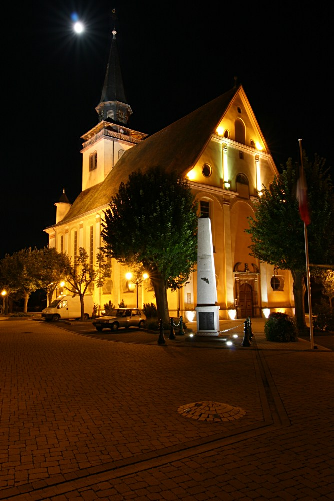 Lauterburger Kirche bei Nacht